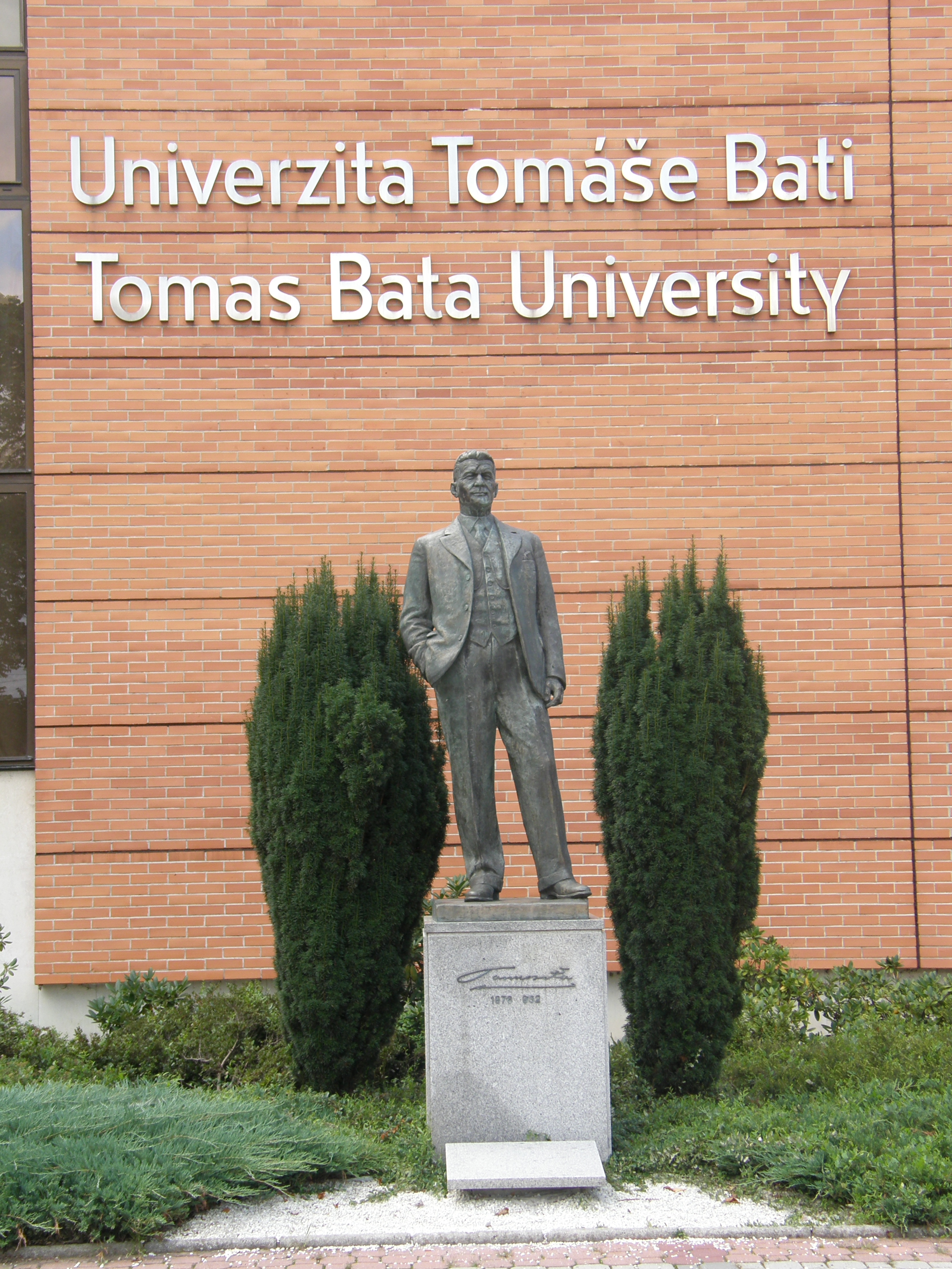 Socha Tomáše Bati u Univerzity Tomáše Bati ve Zlíně